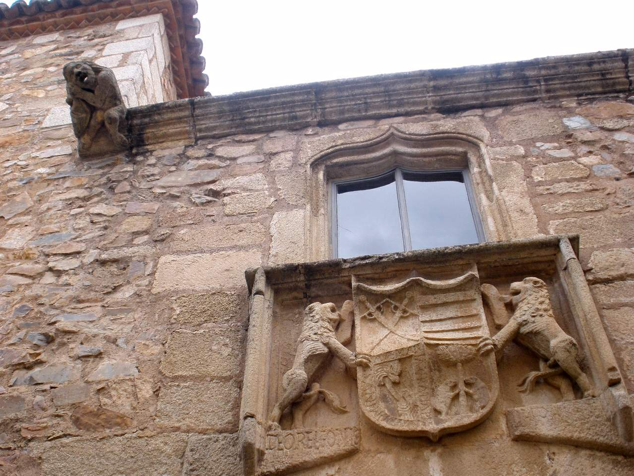 Casa del Mono (Cáceres)